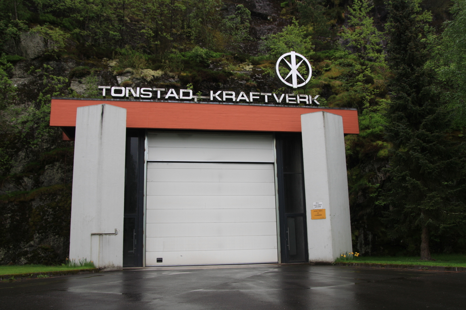 Tonstad Kraftverk